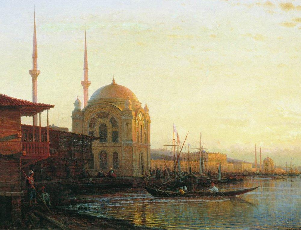 Dolmabahçe Mosque in Constantinople (Istanbul)label QS:Len,"Dolmabahçe Mosque in Constantinople (Istanbul)" label QS:Lru,"Долмабахче Мечеть в Константинополе (Стамбул)"